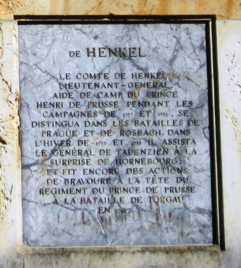 Tafel für Viktor Amadeus Henckel von Donnersmarck (1725–1793) am Obelisken in Rheinsberg